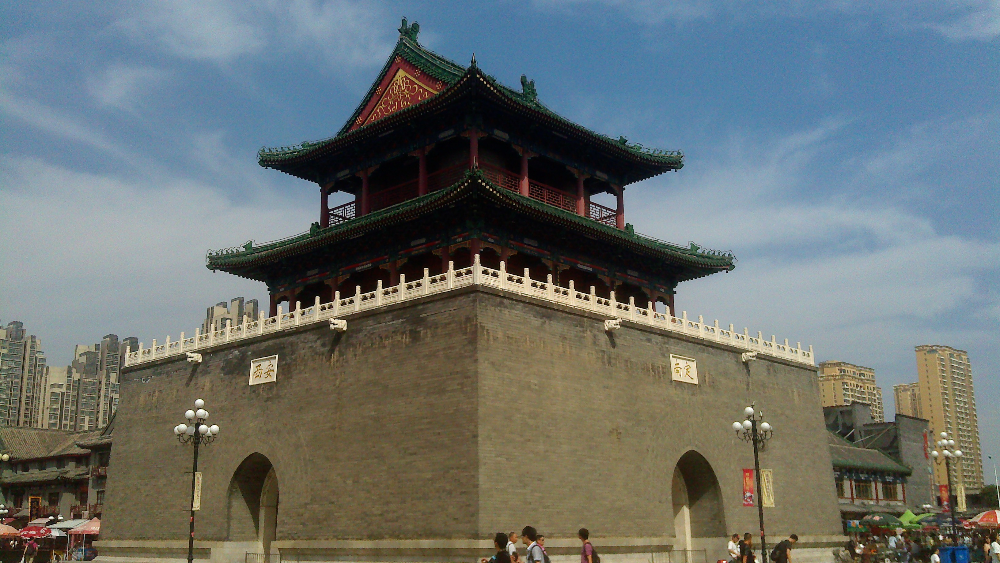 天津衛鼓樓西南角攝影